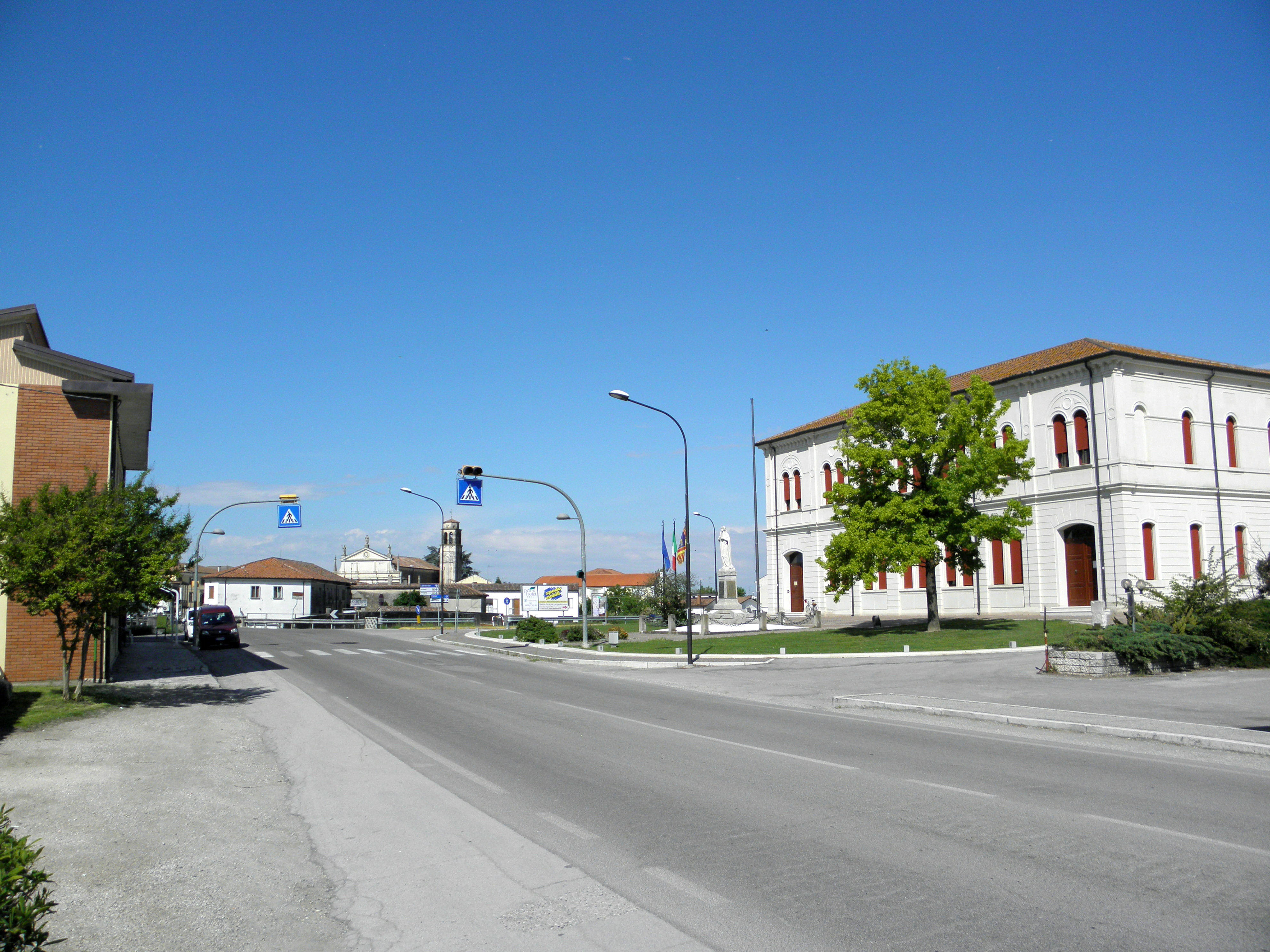 Baruchella, sede municipale del comune di Giacciano con Baruchella: Via Oriano Scavazza e sulla destra la palazzina municipale.